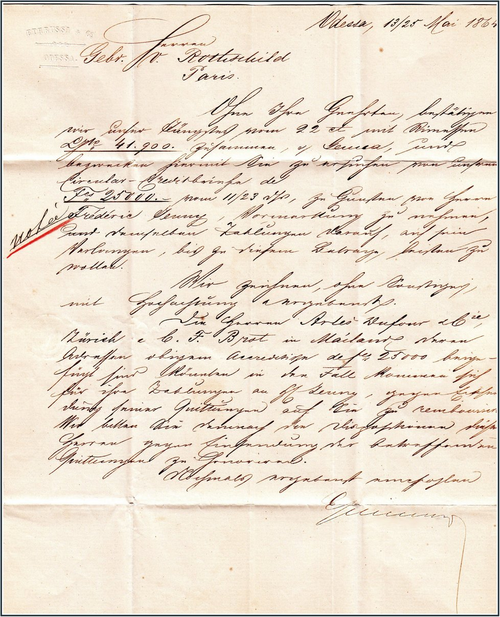 Письмо банкирского дома Эфрусси братьям Ротшильдам (1864г.)